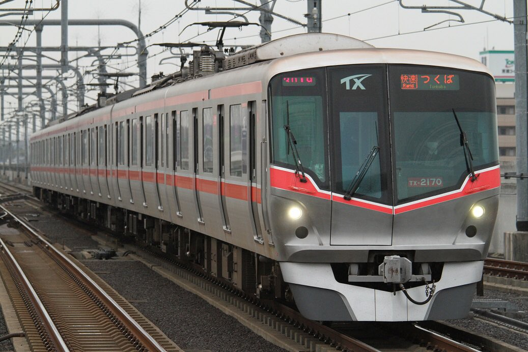 TX-2000系2170F 快速つくば